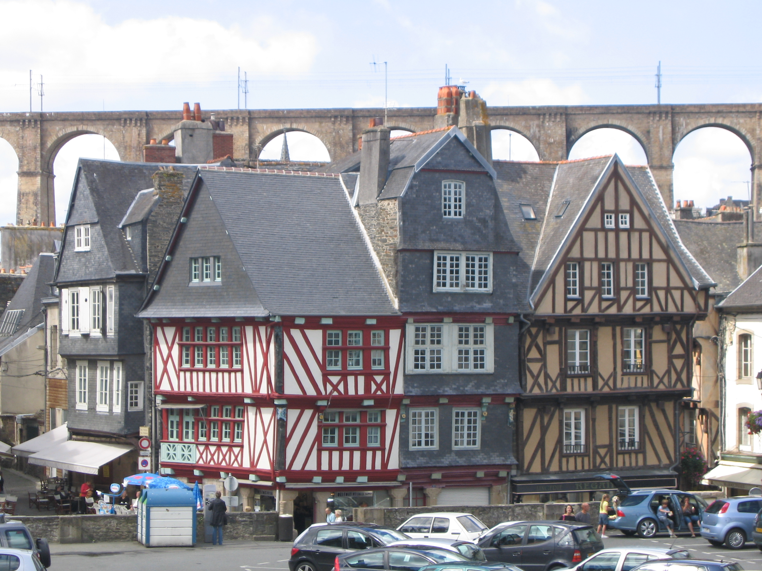 Maisons médiévales à Morlaix